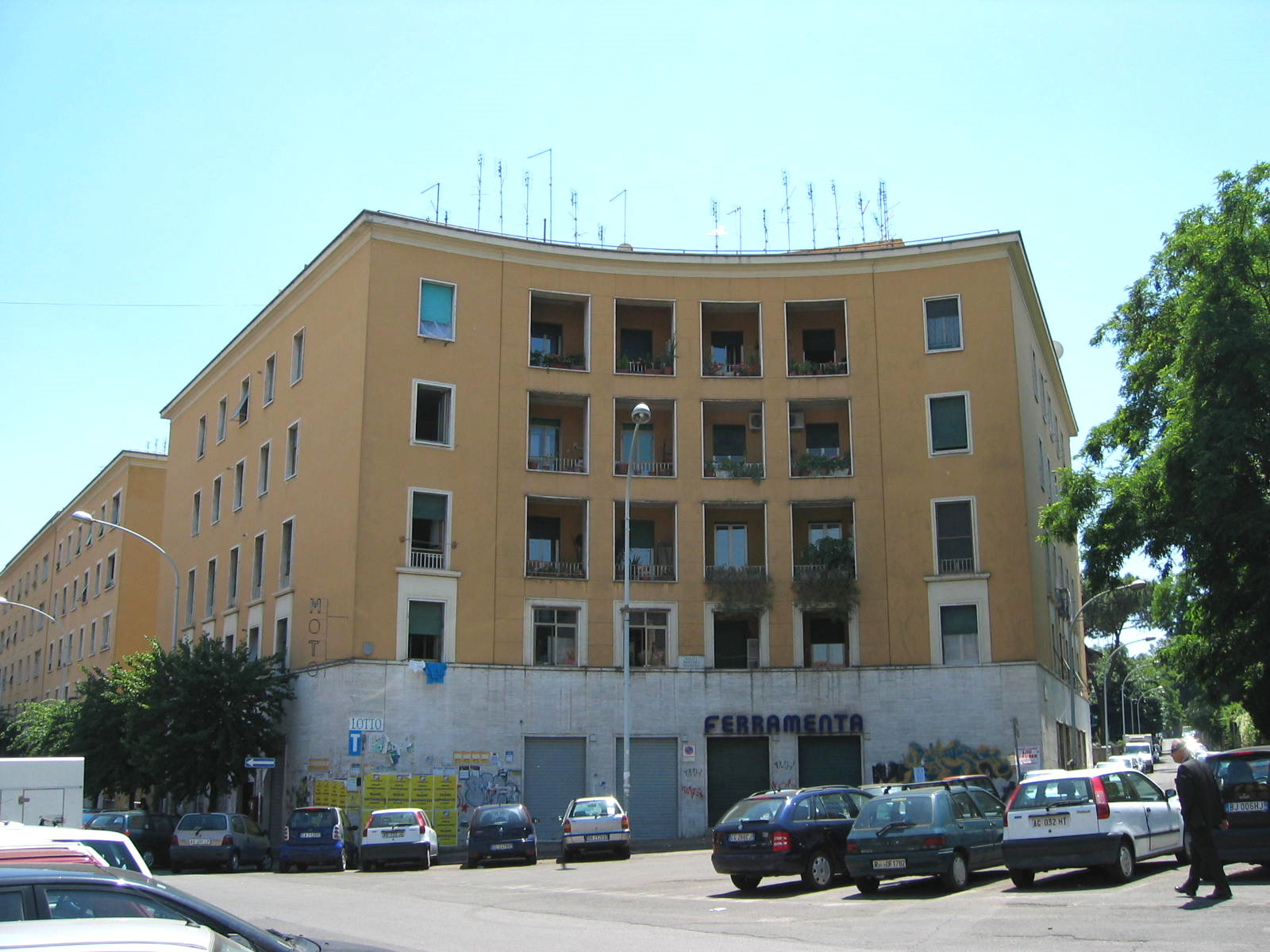 Piazza Pantero Pantera, Garbatella, Roma.